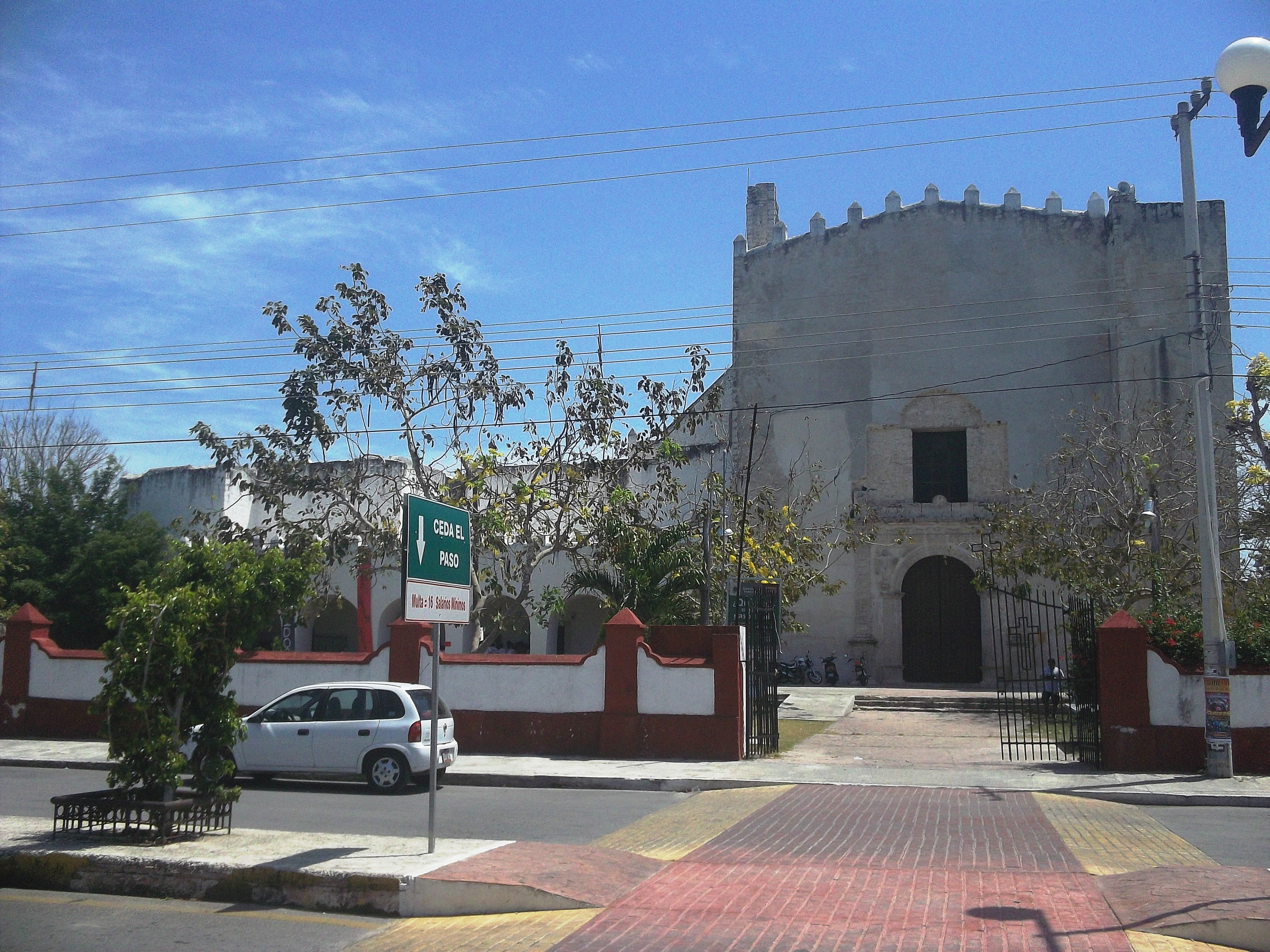 Iglesia principal de Dzidzantún, Yucatán.